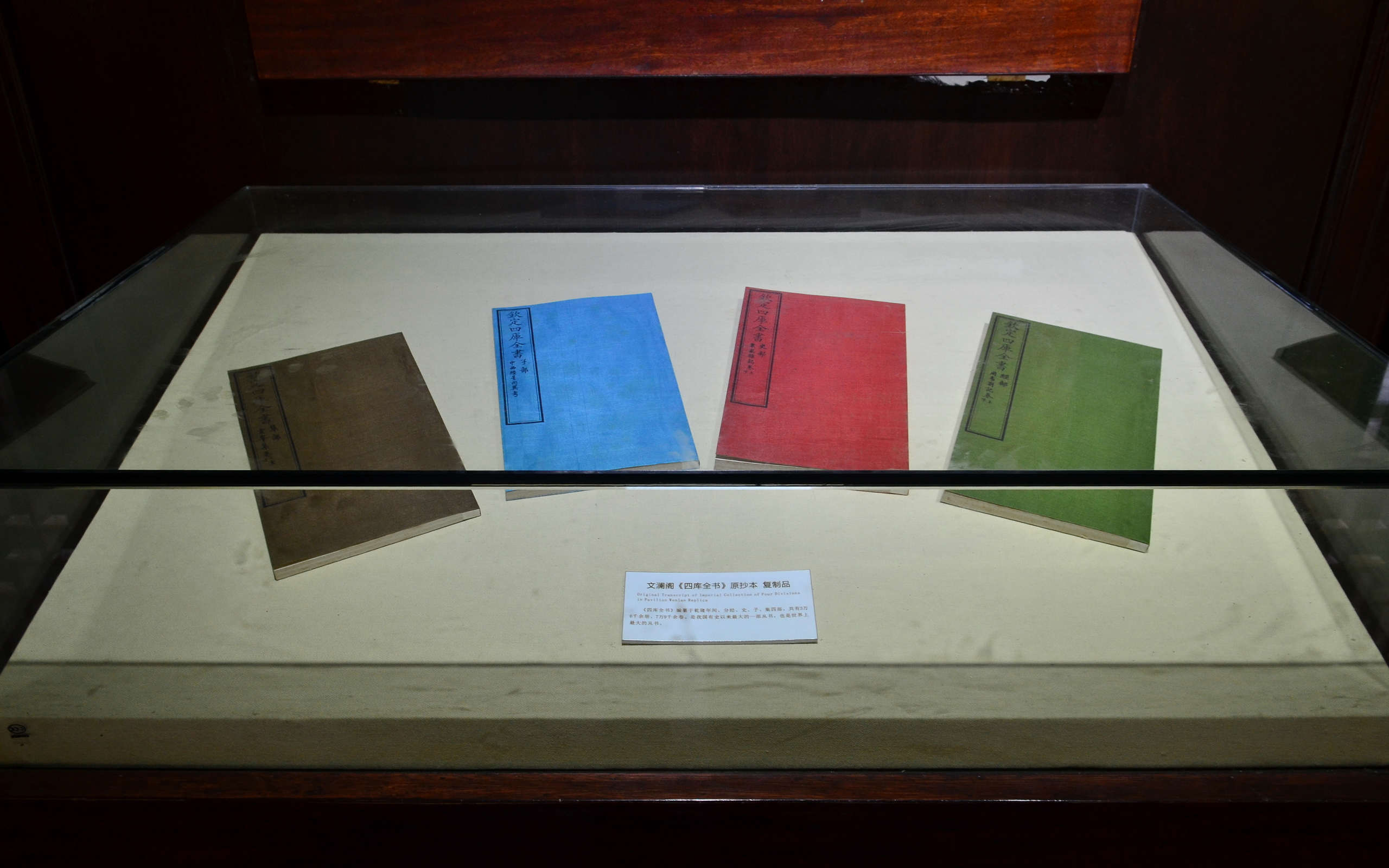 文澜阁《四库全书》原抄本复制品